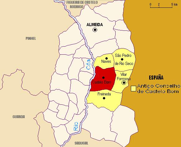 Localização de Castelo Bom e do seu antigo concelho, no actual concelho de Almeida (dist. Guarda, Portugal)